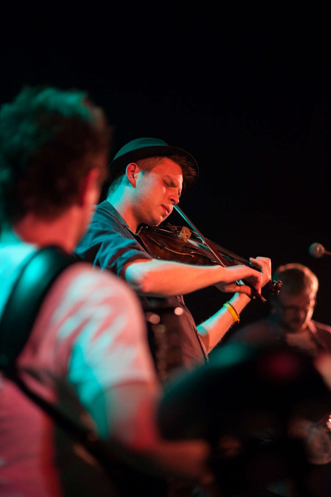 Koncert zespołu Neoklez w ramach II Śląskiego Festiwalu Kultury Żydowskiej